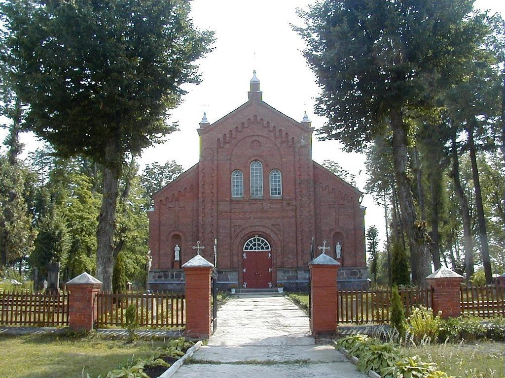 Pustiņas katoļu baznīca Robežniekos 2002-08-11